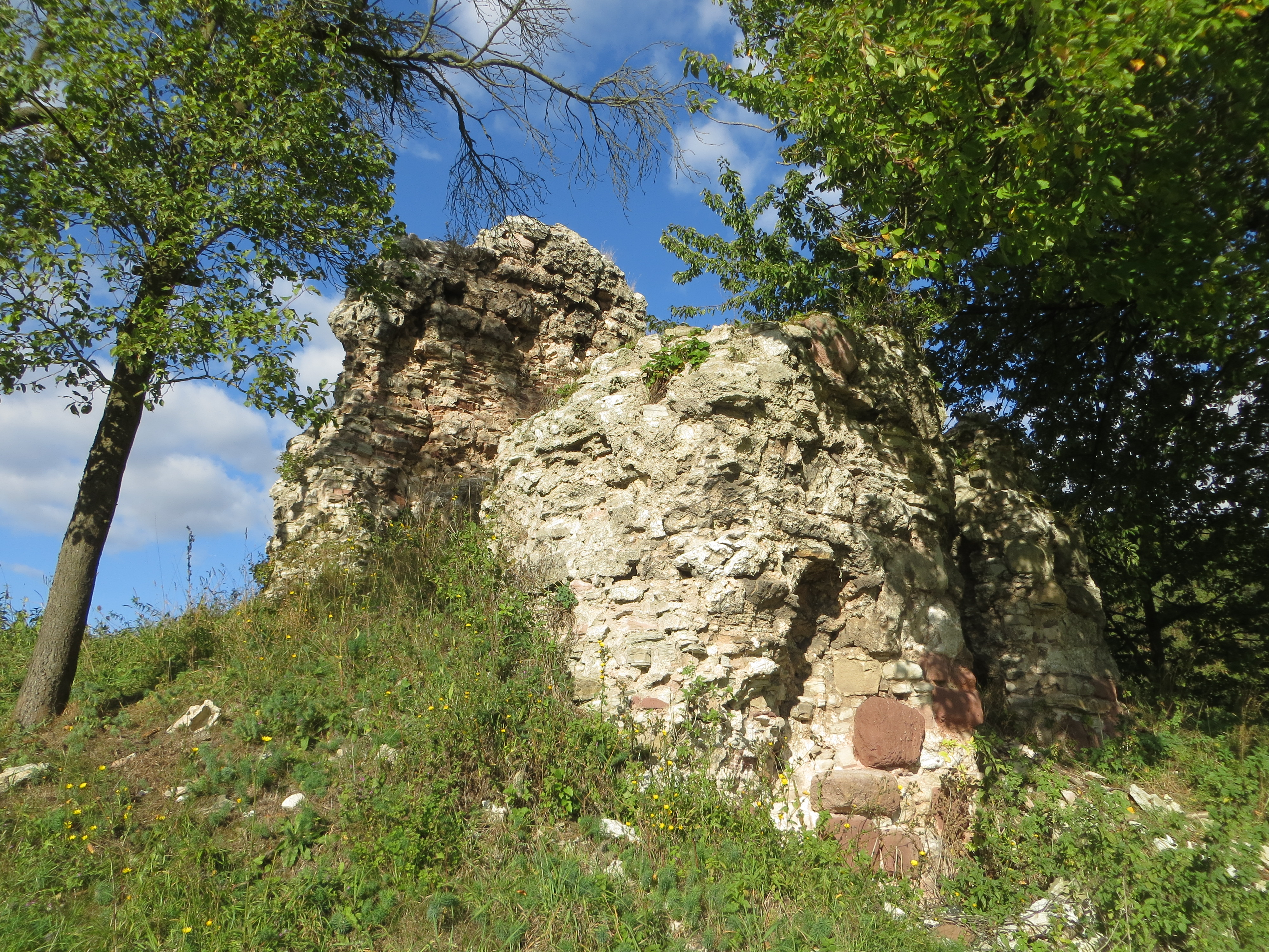 Wüste Kirche „Bernecke“ St. AndreasThis is a photograph of an architectural monument. 84527